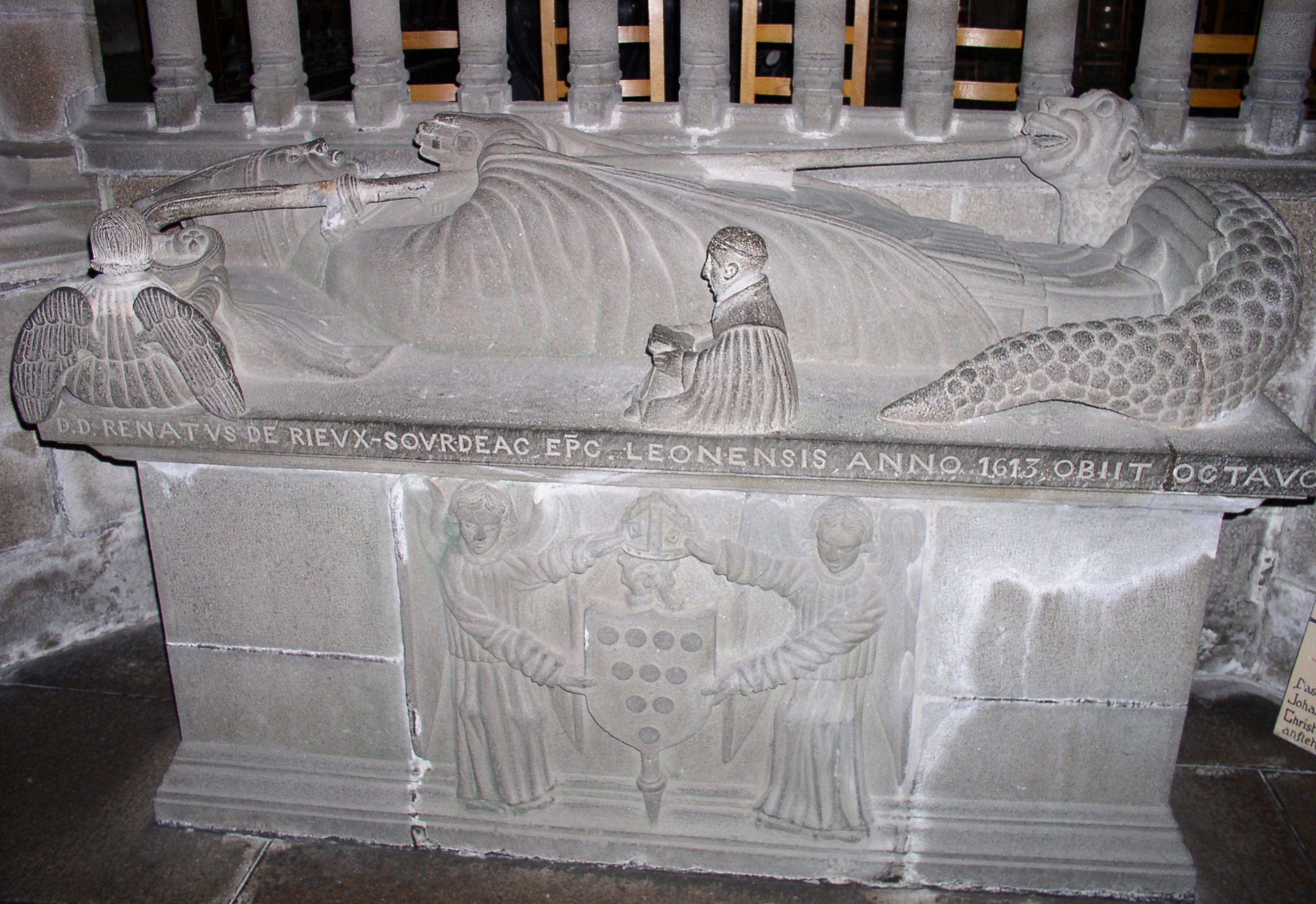 Gisant en pierre de René de Rieux-Sourdéac, évêque de Léon (+ 1651). Evêque en habit et mitré, deux anges portant le cousin, un dragon au pied, inscription autour de la table, un moine lisant en flanc, écusson en flanc (Dix besants 4, 3, 2, 1) porté par deux anges. This object is indexed in the base Palissy, database of the French furniture patrimony of the French ministry of culture, under the references PM29001688 and IM29000780.